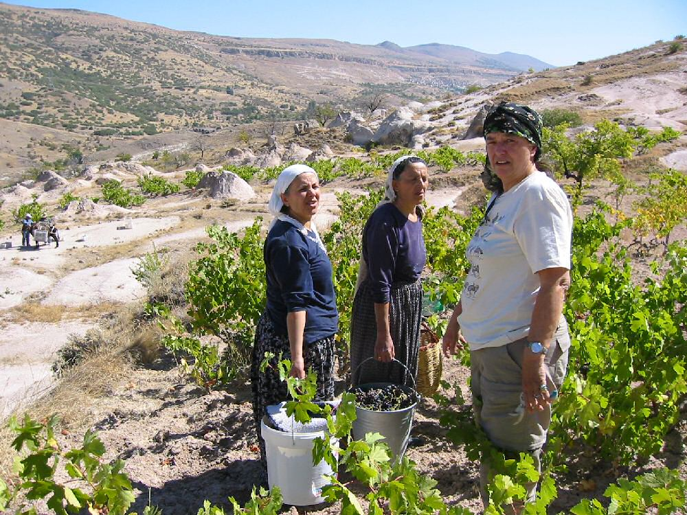 Türkiye'de bir bağ.